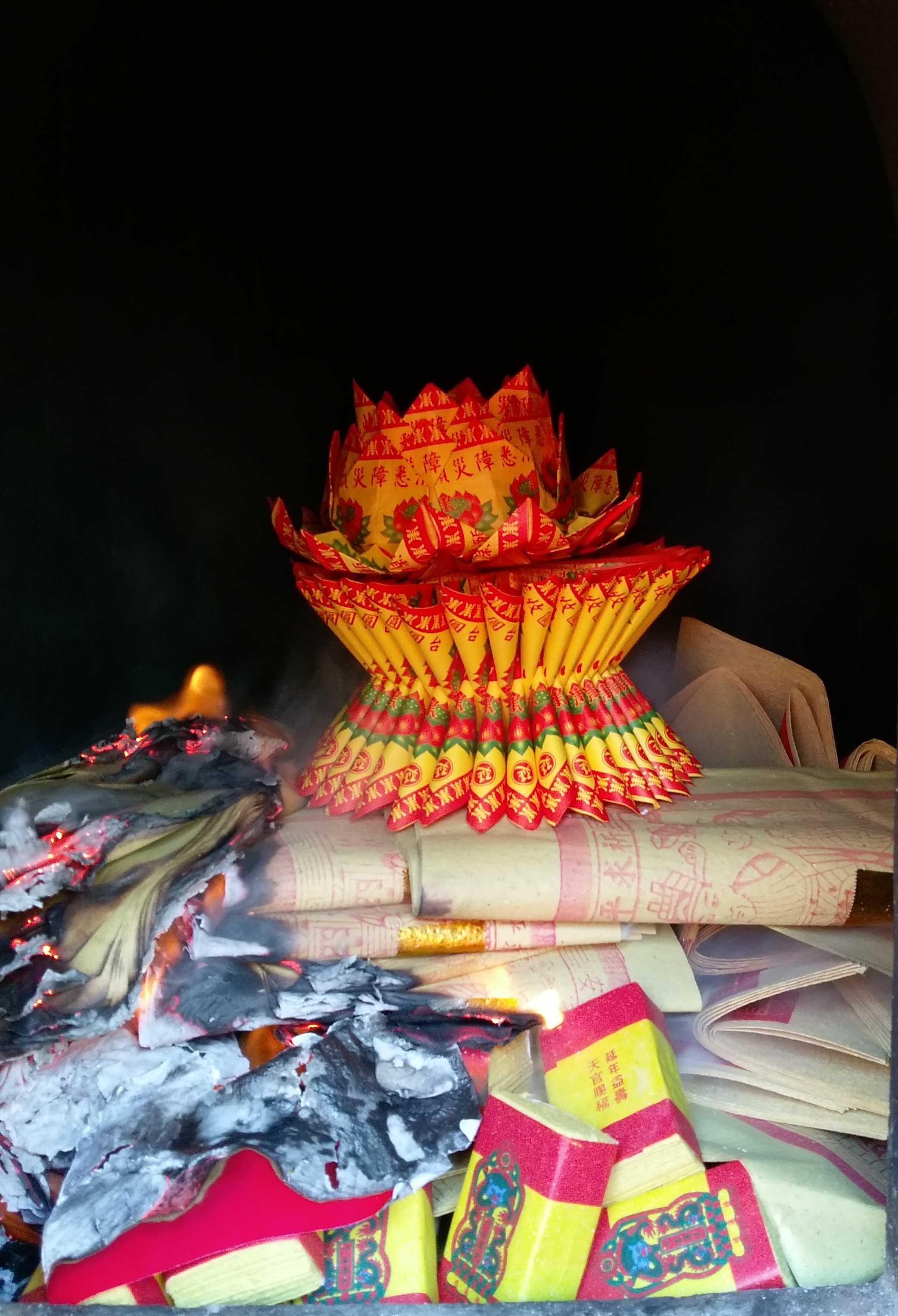 中文（台灣）: 燒化各式紙錢